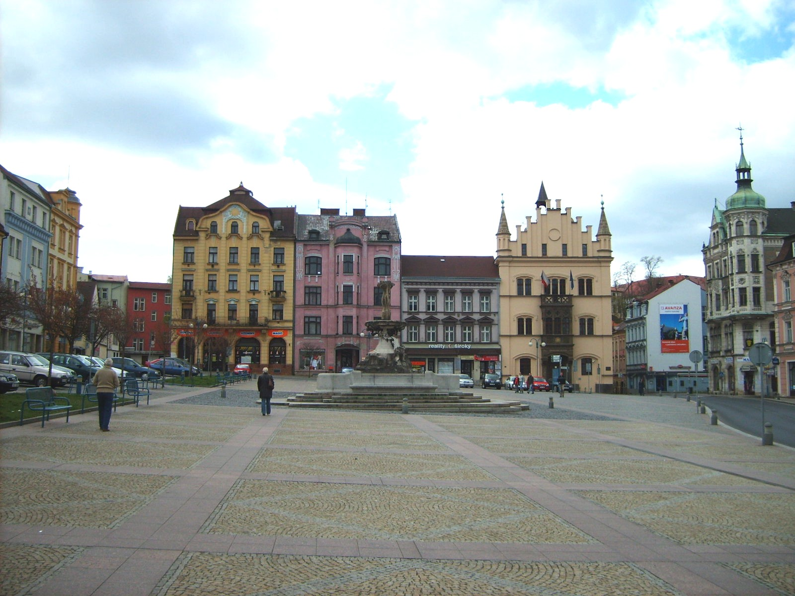 Masarykovo náměstí v Děčíně